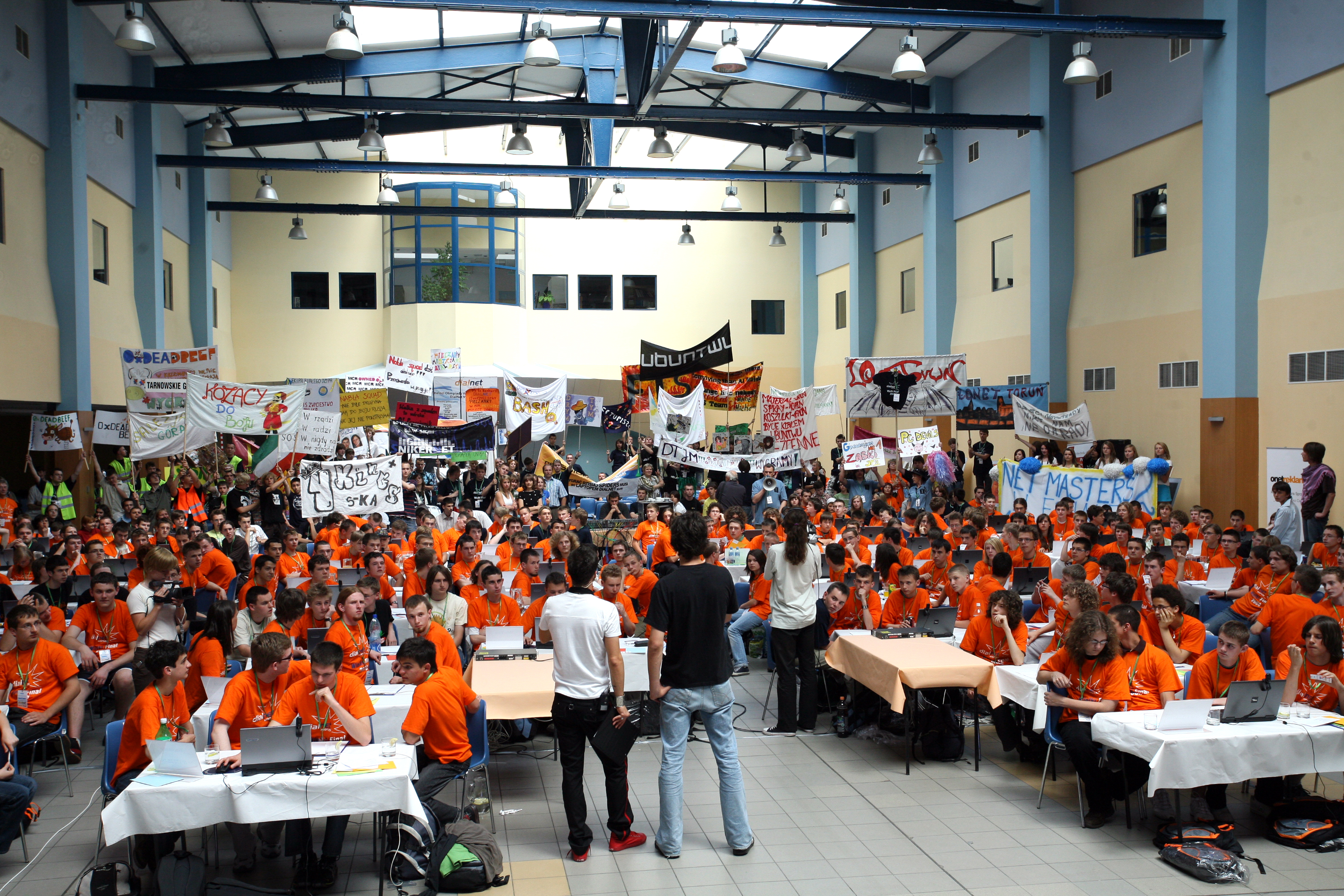 Wielki Finał DialNet Masters 2008